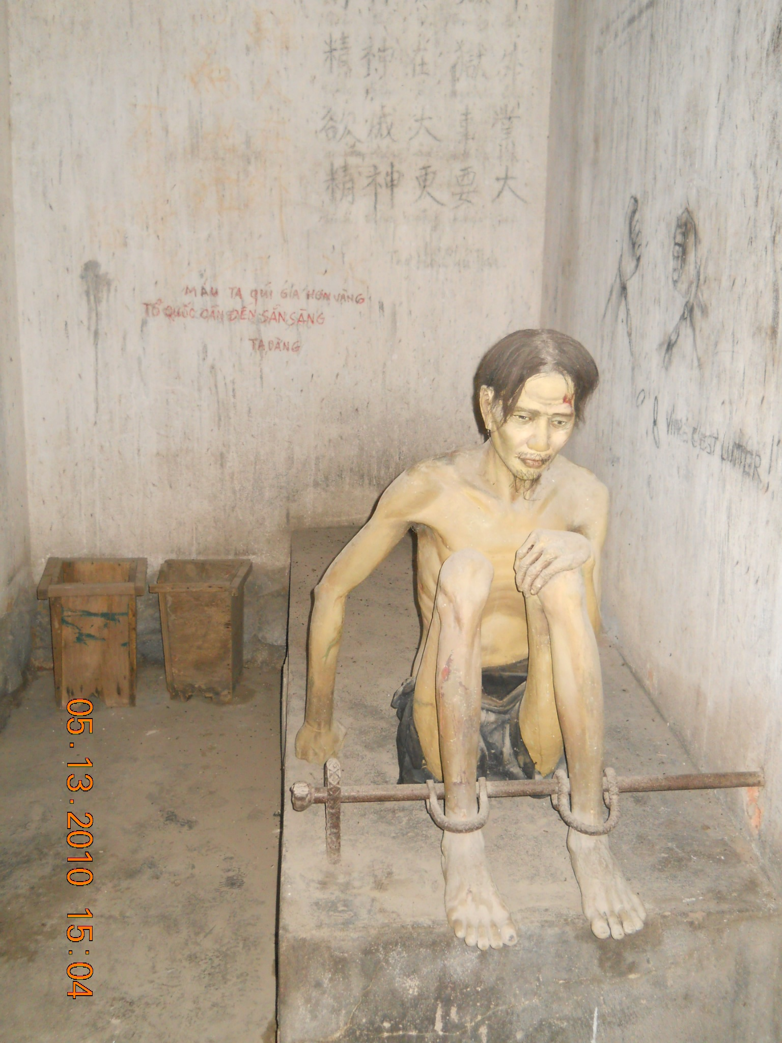 Tượng tù nhân chính trị dưới chế độ VNCH ở bảo tàng Chứng tích chiến tranh, TP Hồ Chí Minh